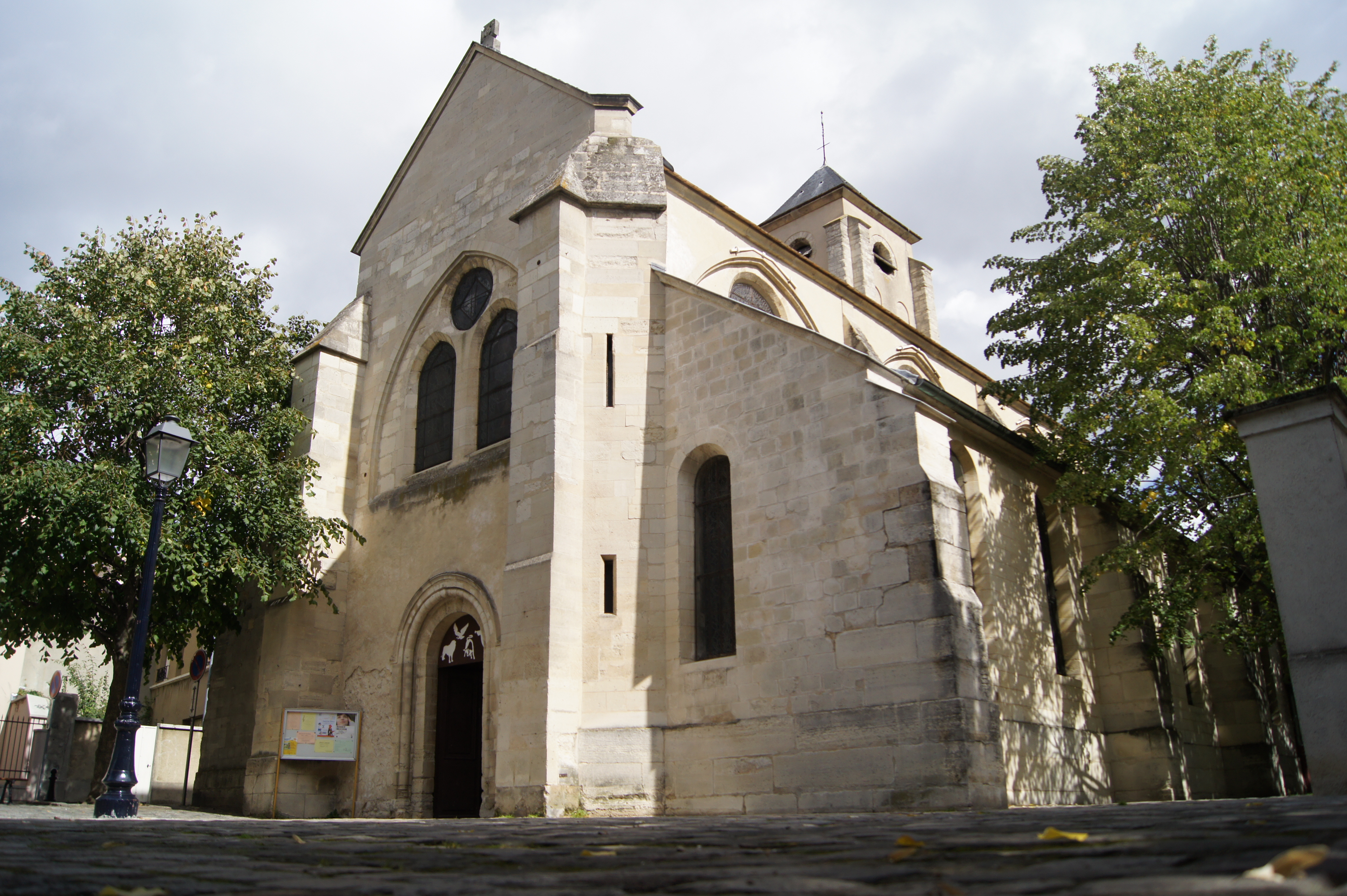 Église Saint-Satrunin de Champigny-sur-Marne (94).